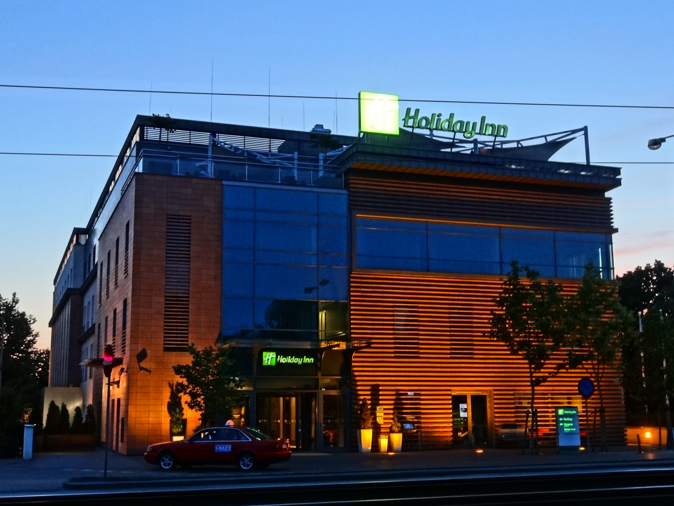 Hotel Holliday Inn w Bydgoszczy przy ul. Grodzkiej (zbud. 2010 r.)